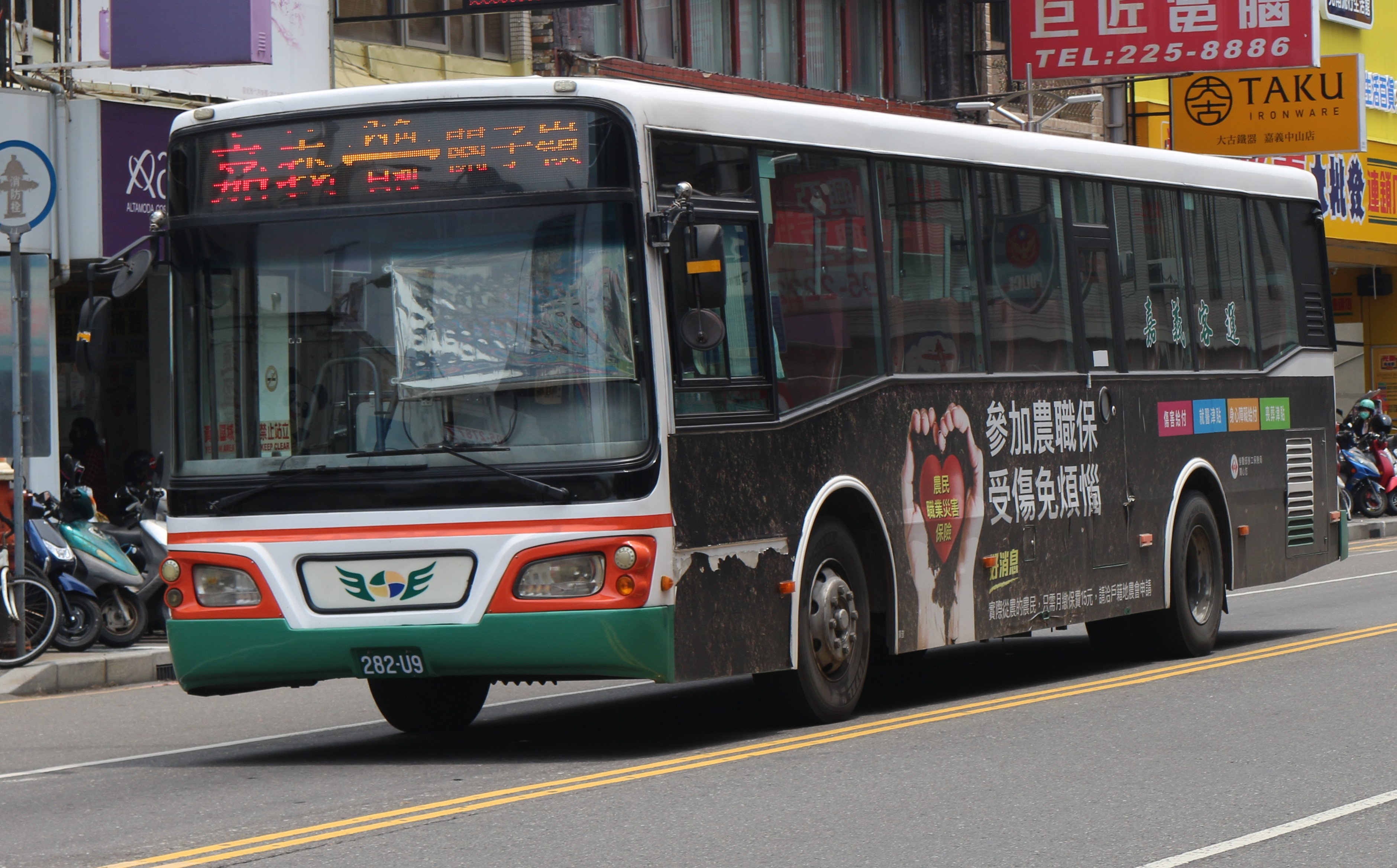 嘉義客運 HINO RK8JRSA